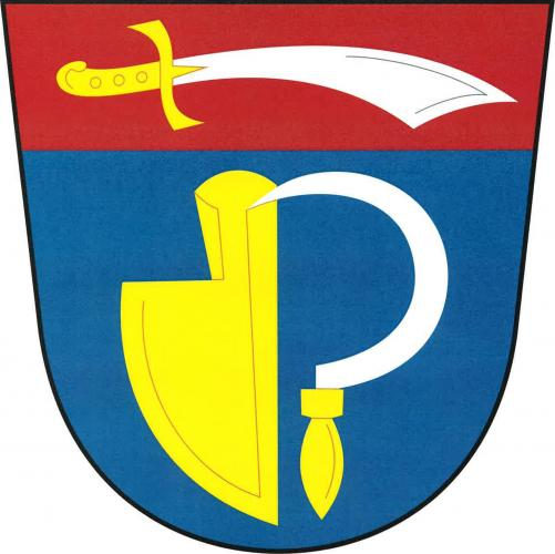 Lazníčky znak